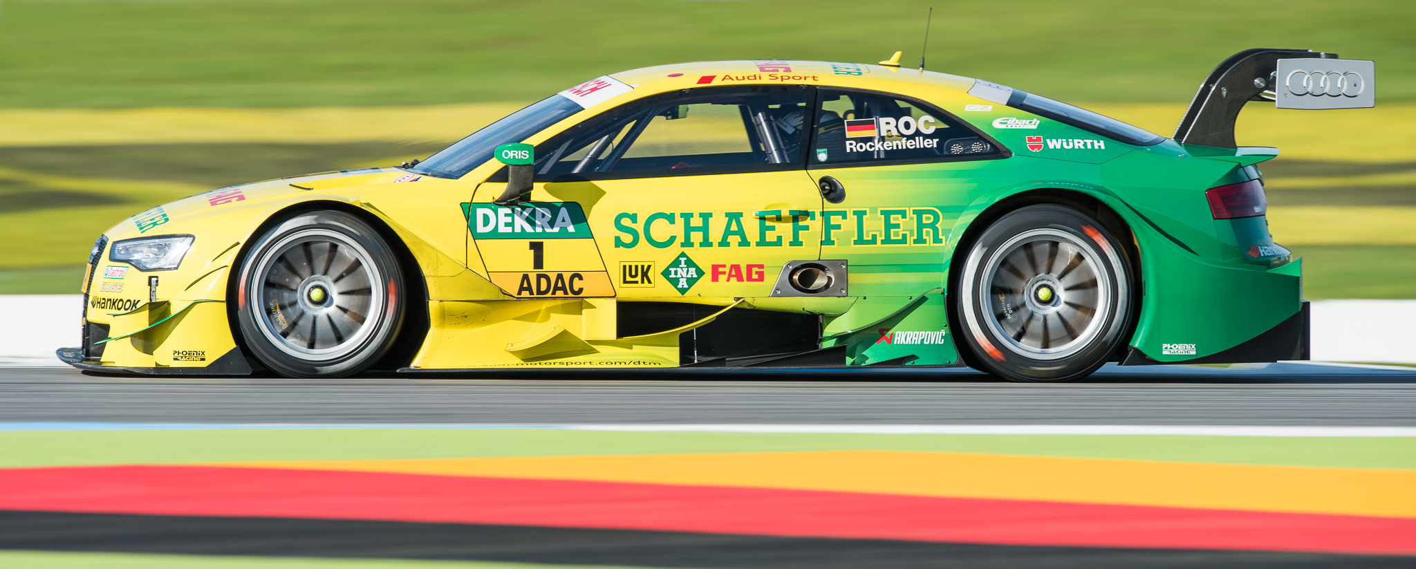 DTM,Deutsche Tourenwagen Masters,Hockenheimring,Mike Rockenfeller,Motorsport,Phoenix Racing GmbH,Schaeffler Audi RS 5 DTM